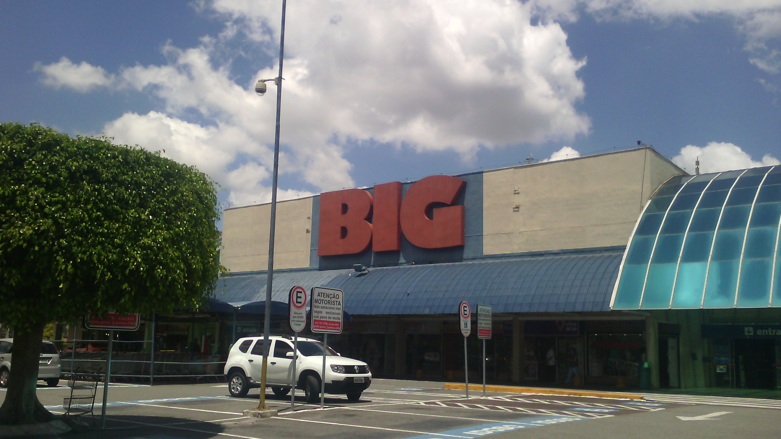 Foto da faixada frontal Hipermercado BIG Boa Vista, em Curitiba/PR, tirada na data de 22/02/2018.